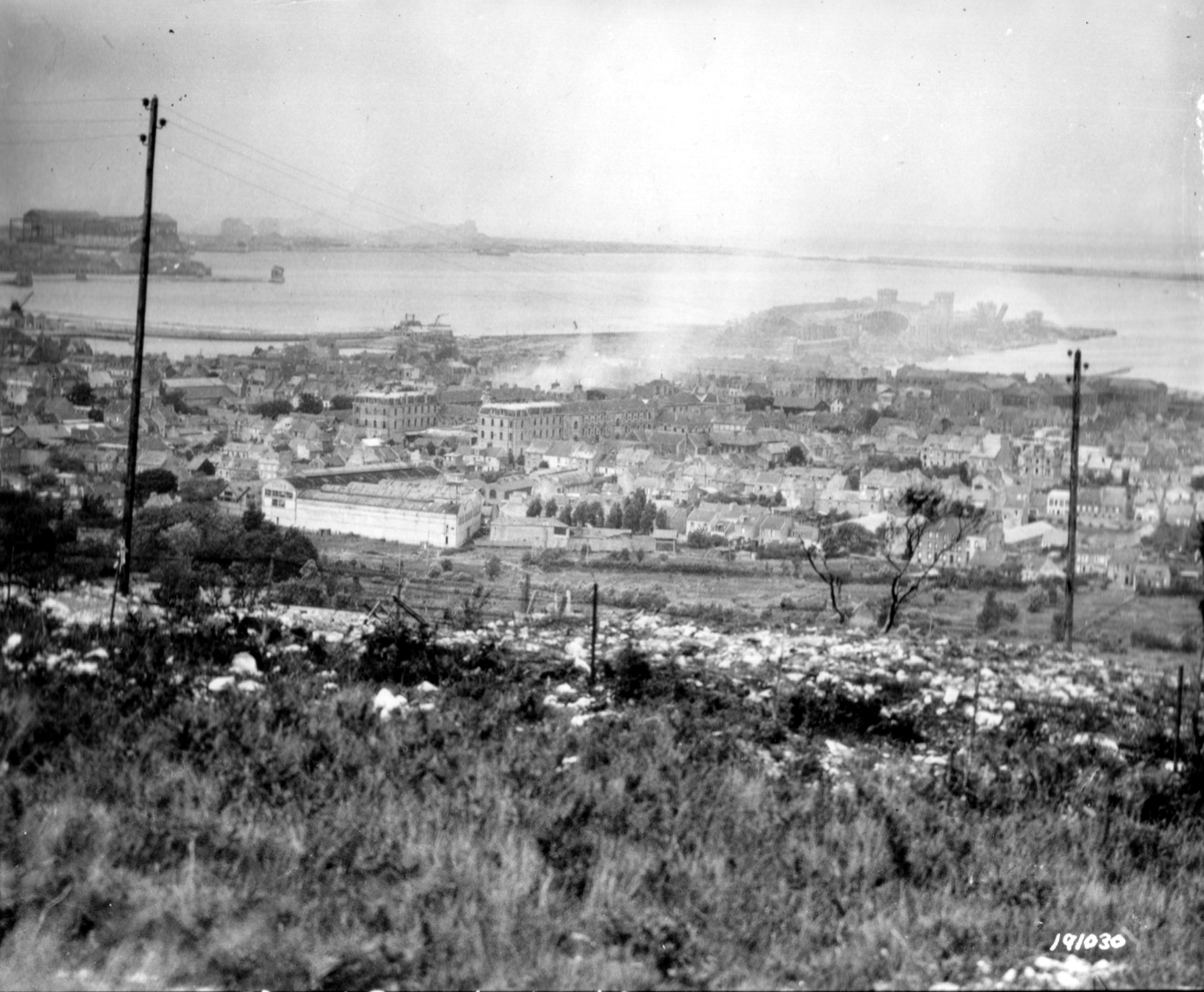 Port de Cherbourg bombardé